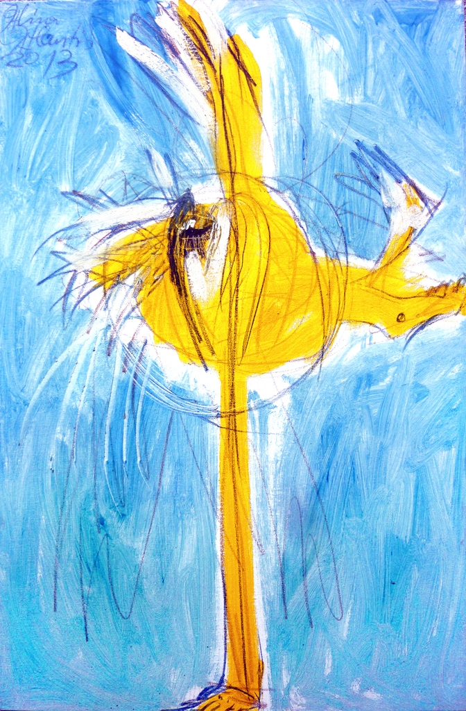 Gipfelbauplan